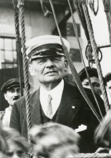 Eduard Spelterini am 12. August 1912 in Mürren vor der Fahrt nach Turin